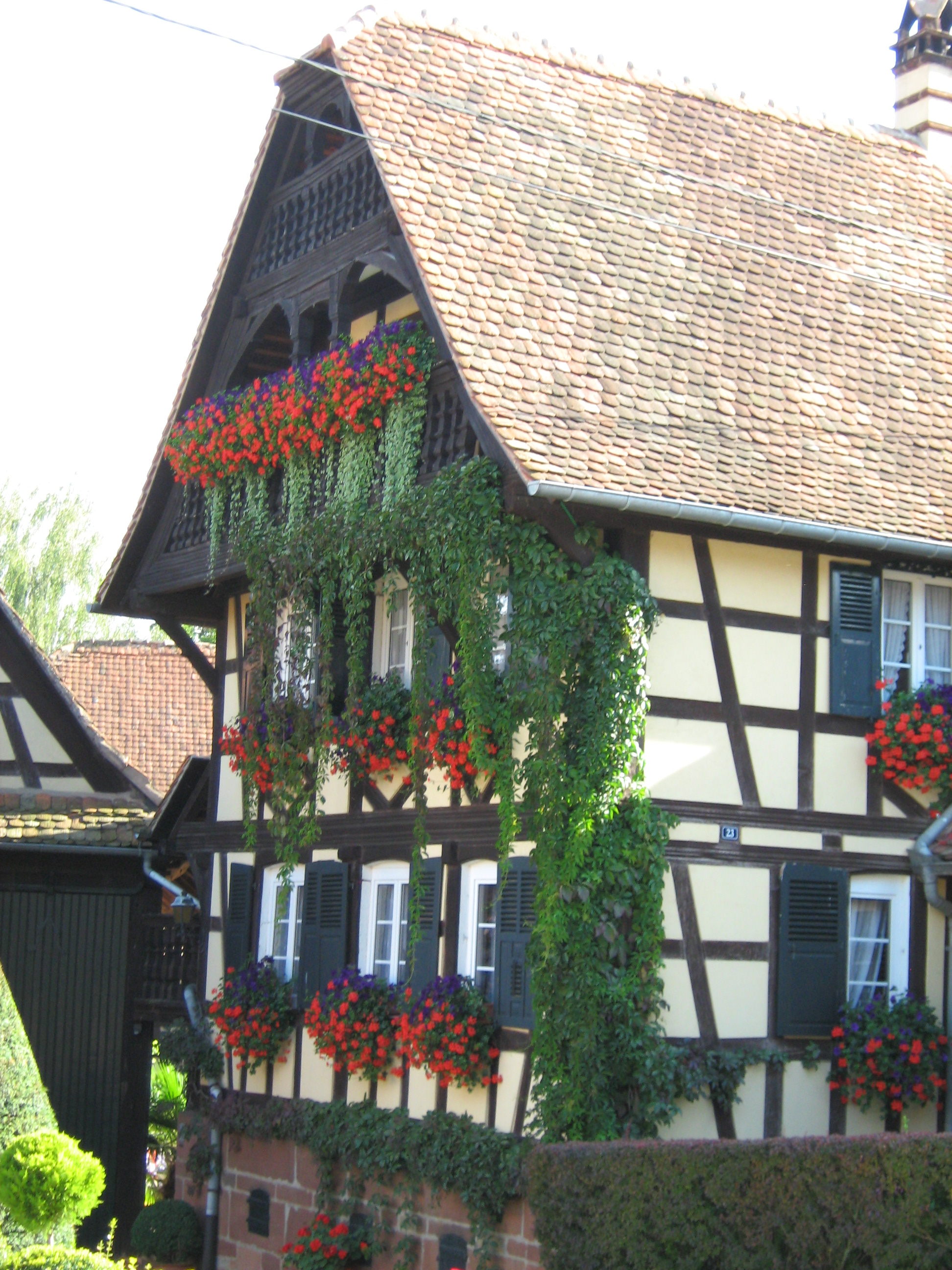 maison à colombage à Alteckendorf